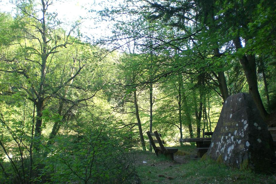 Ritterstein Emil Haupt im Leinbachtal bei Hochspeyer